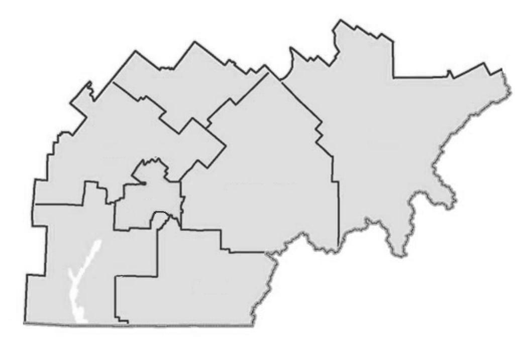 Carte de l'Estrie